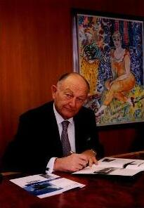 איש עסקים ישראלי-אמריקאי, בבעלותו היו חברת האוניות קרניבל וקבוצת הכדורסל מיאמי היט מליגת ה-NBA.